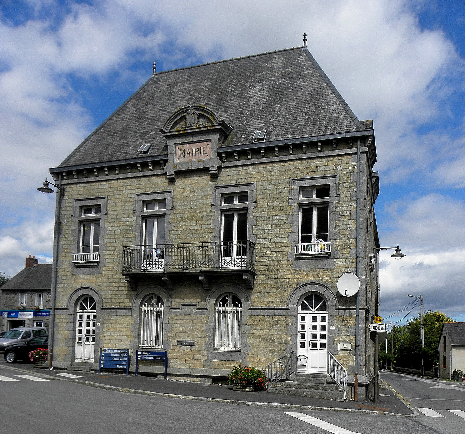 Ancienne mairie d'Éréac (22).